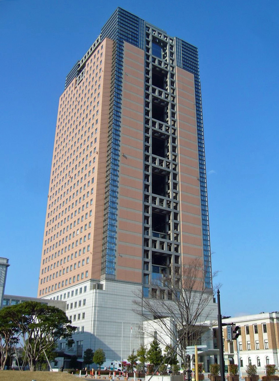 群馬県庁 新庁舎 2006年12月 Bakkai撮影 Category:官公庁の画像 Category:群馬県の画像